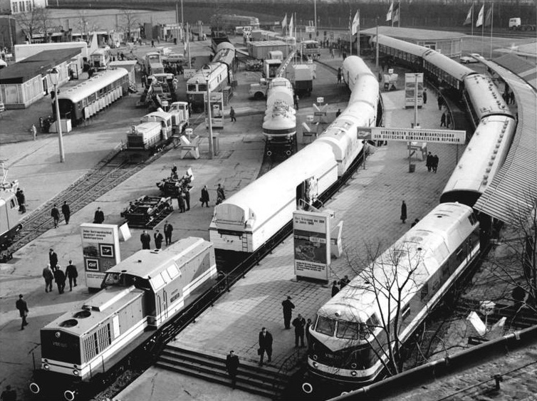 Leipzig, Frühjahrsmesse, Schienenfahrzeuge Zentralbild Link b-ki. 7.3.1967 Leipziger Frühjahrsmesse 1967 technische Messe. Übersicht über das Ausstellungsgelände der Schienenfahrzeuge.